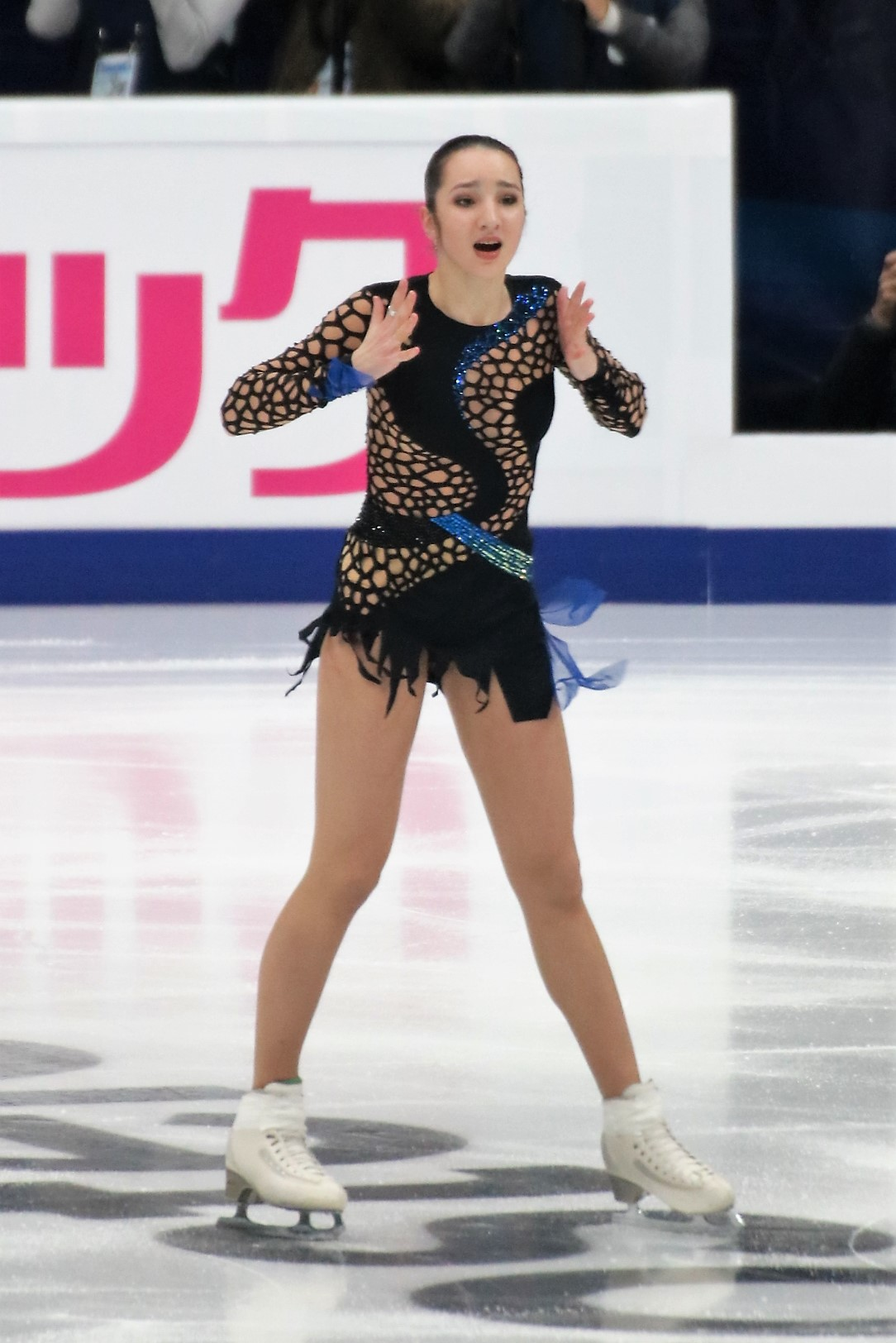 Полина Цурская (Россия) на Rostelecom Cup 2018